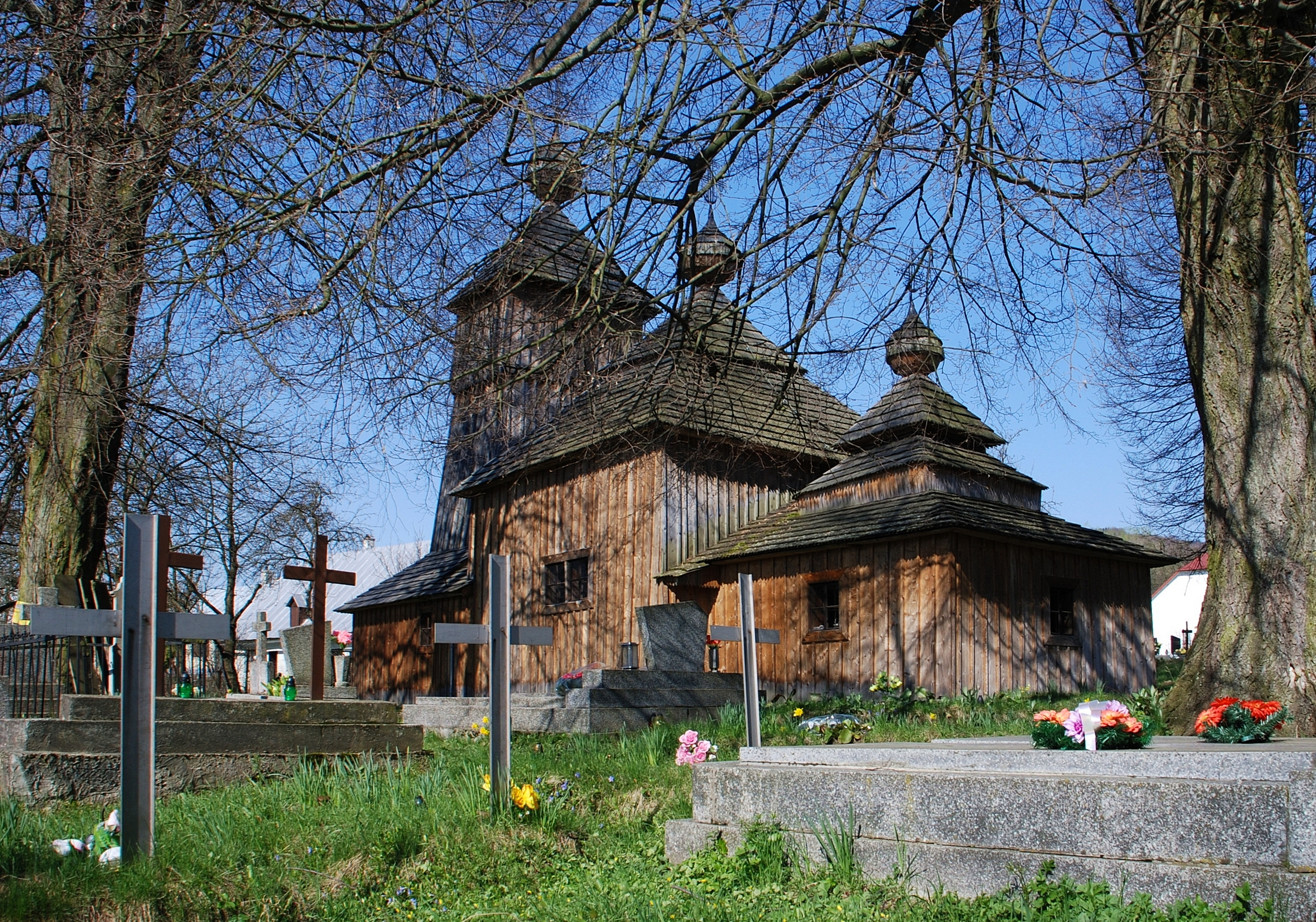 wieś Jedlinka